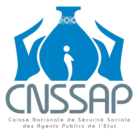 Logo de la CNSSAP